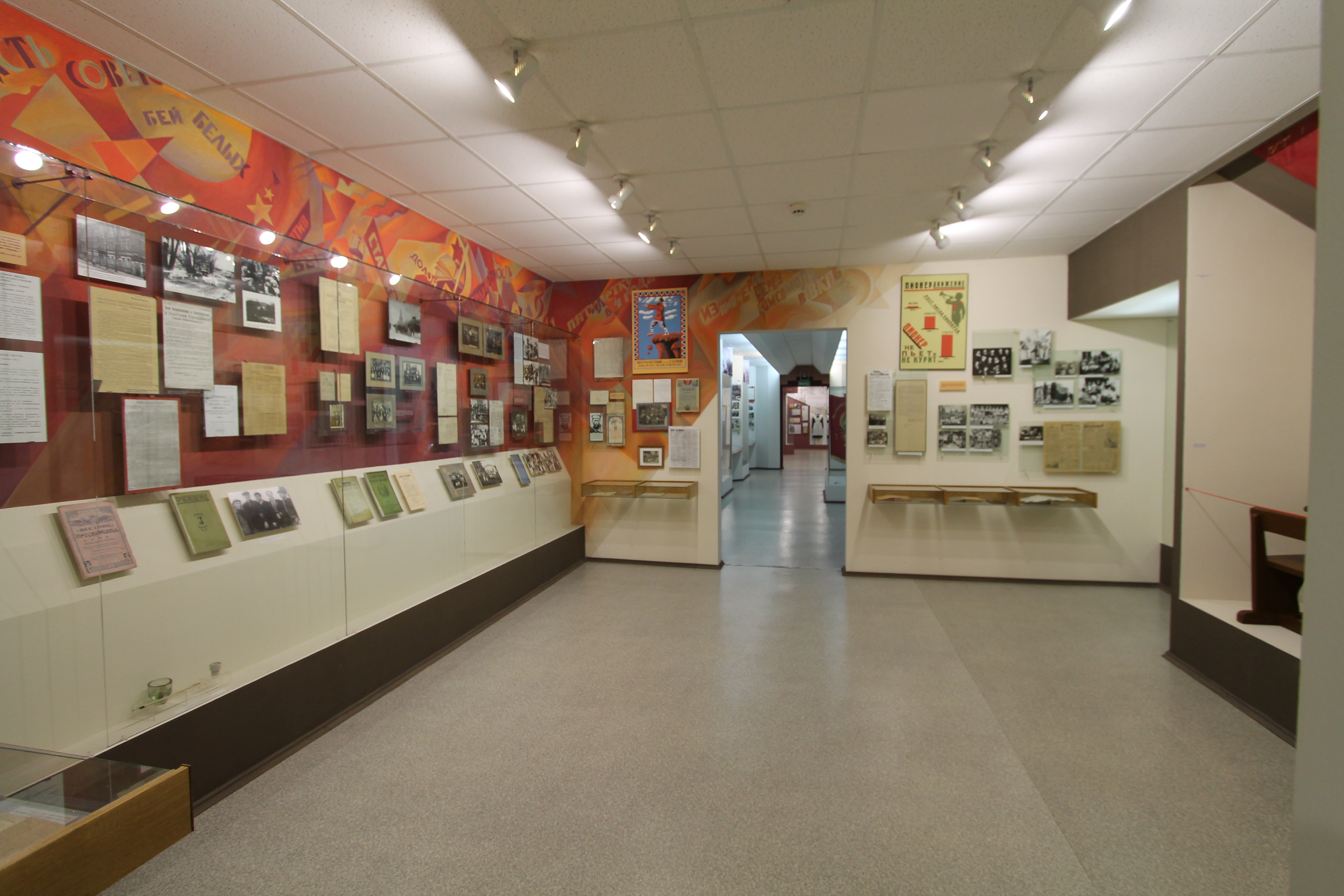 Экспозиция зала 3